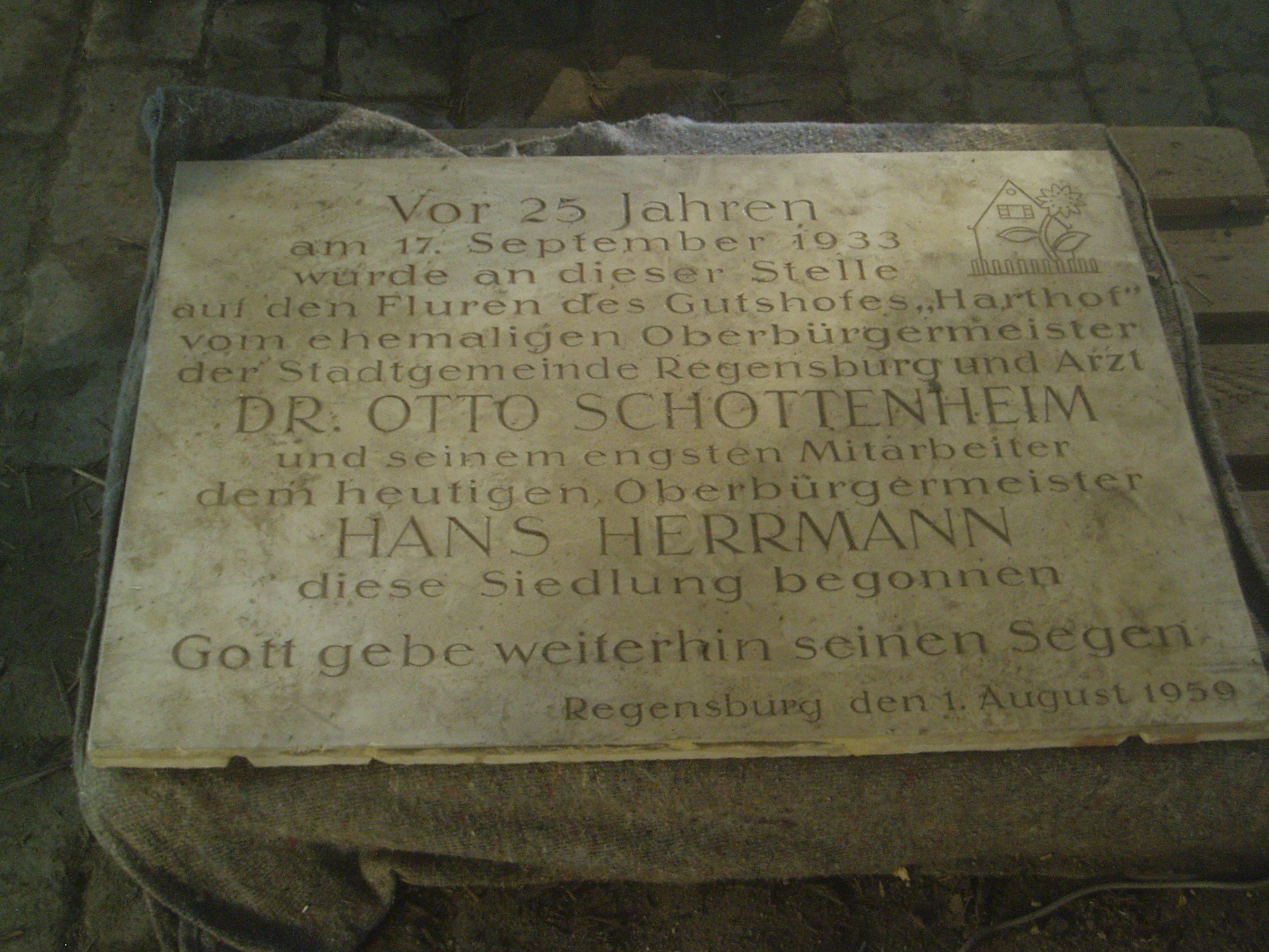 Die Gedenktafel für den ehemaligen NS-Bürgermeister Regensburgs Otto Schottenheim war von August 1959 bis Mitte 1990er am Gemeinschaftshaus der Siedlervereinigung angebracht.